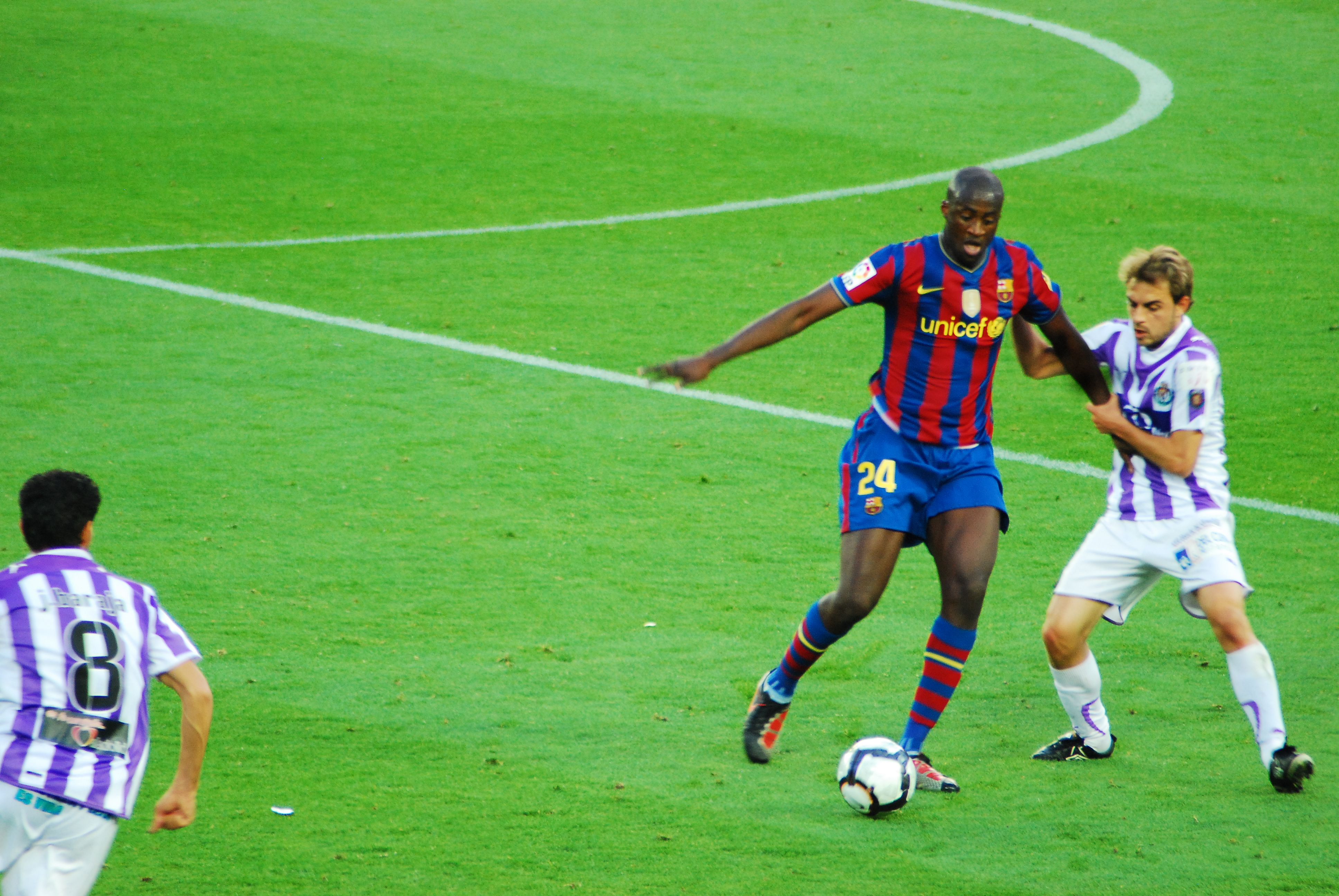 Touré Yaya disputa un balón con un jugador del Real Valladolid, en un partido de la Liga 2009-2010.